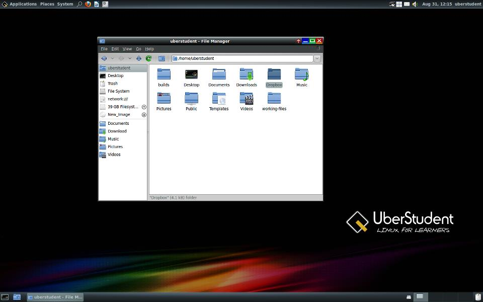 Ubesrstudent 2.0 preview screesnhot